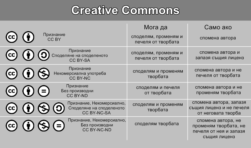 Опростено определение за различните видове лицензи.